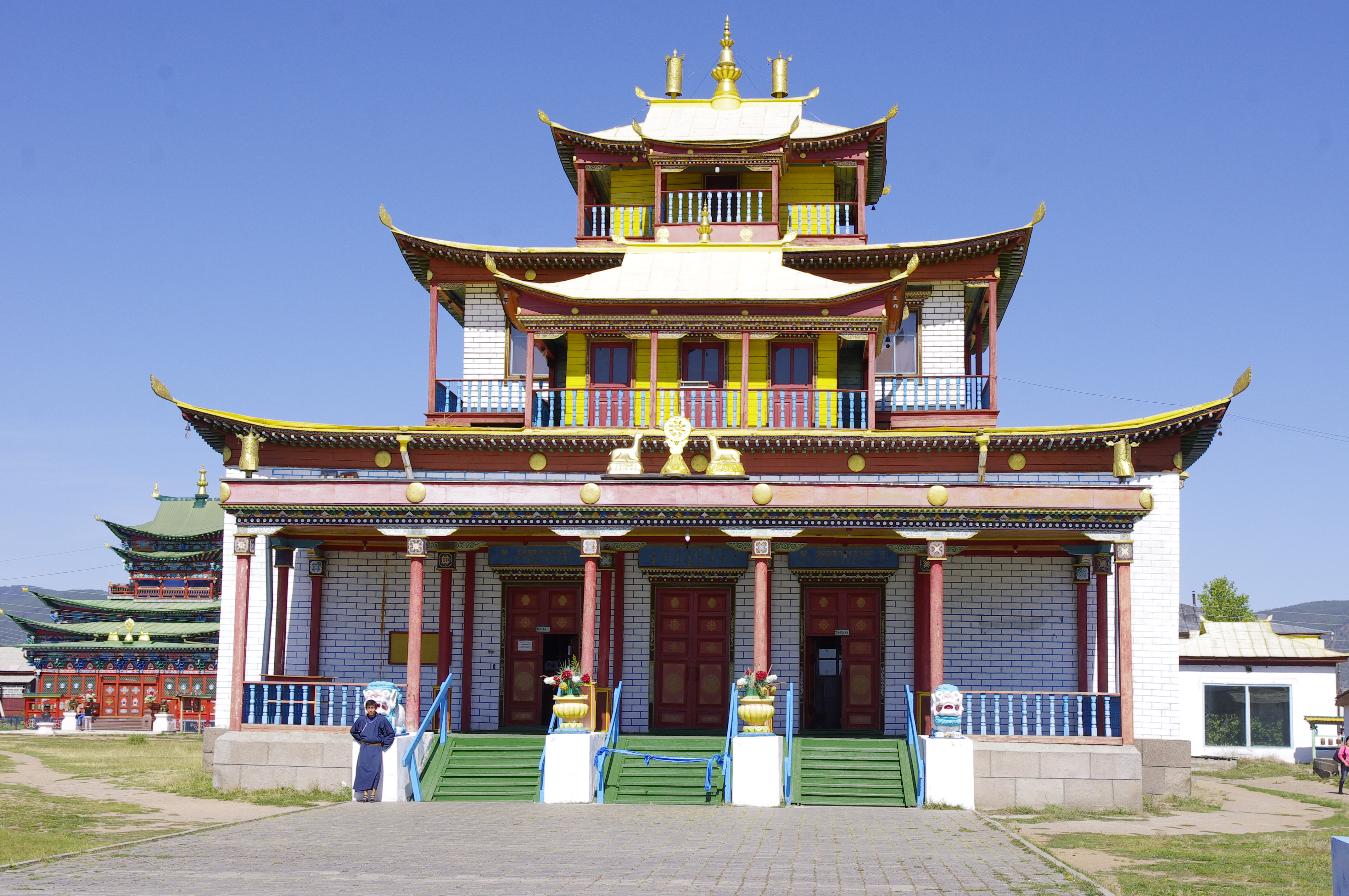 Lato 2013.